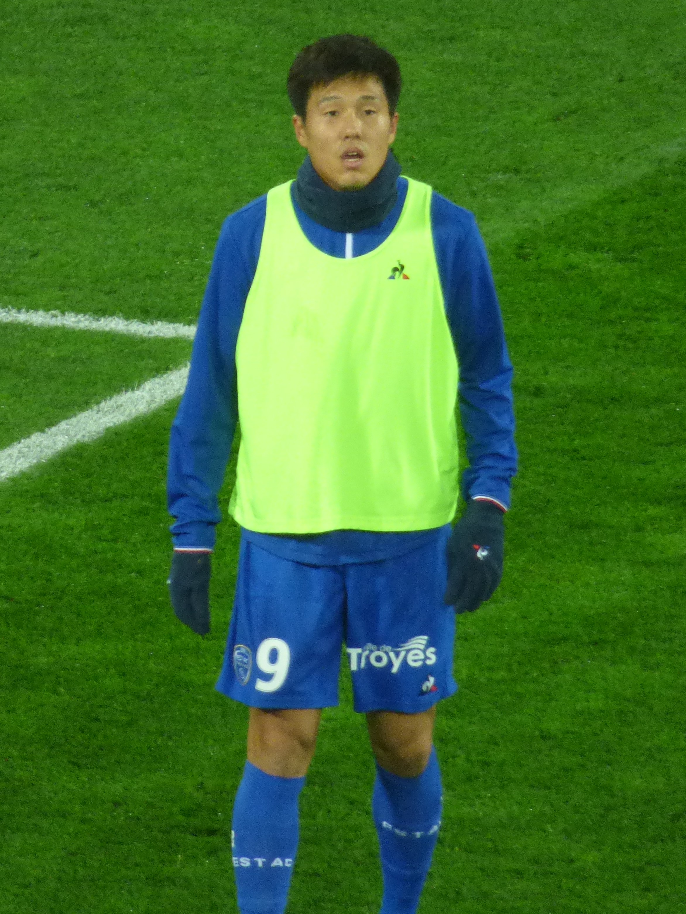 Suk Hyun-jun lors du match RC Lens / ES Troyes AC, comptant pour la vingt-troisième journée du championnat de France de football de Ligue 2 2019-2020, le 4 février 2020, au Stade Bollaert-Delelis de Lens